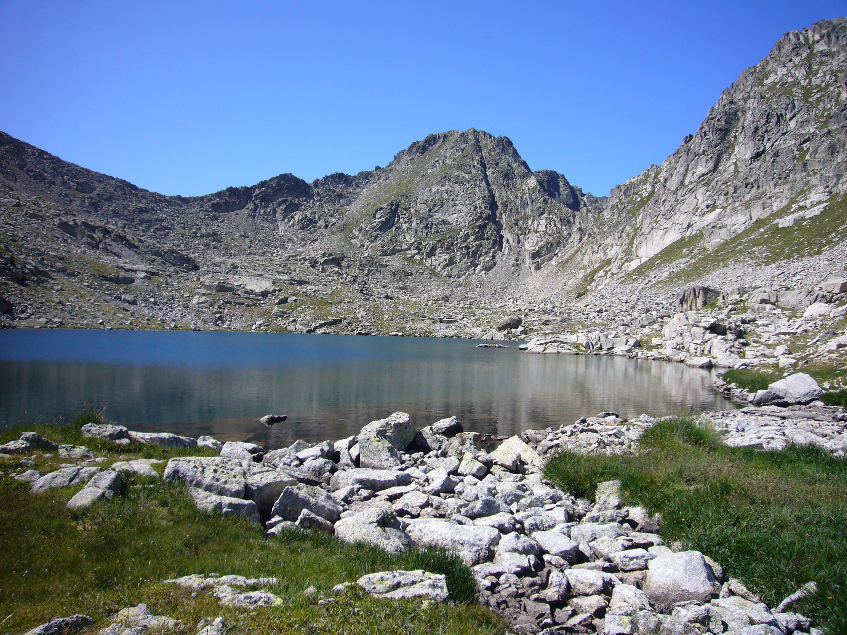 Estany Superior dels Gavatxos, Collada dels Gavatxos i Coll de la Montanyeta, vistos des de la Coma dels Pescadors; la Vall de Boí, Alta Ribagorça, Catalunya